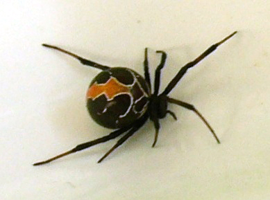 Lab-reared female Latrodectus katipo.